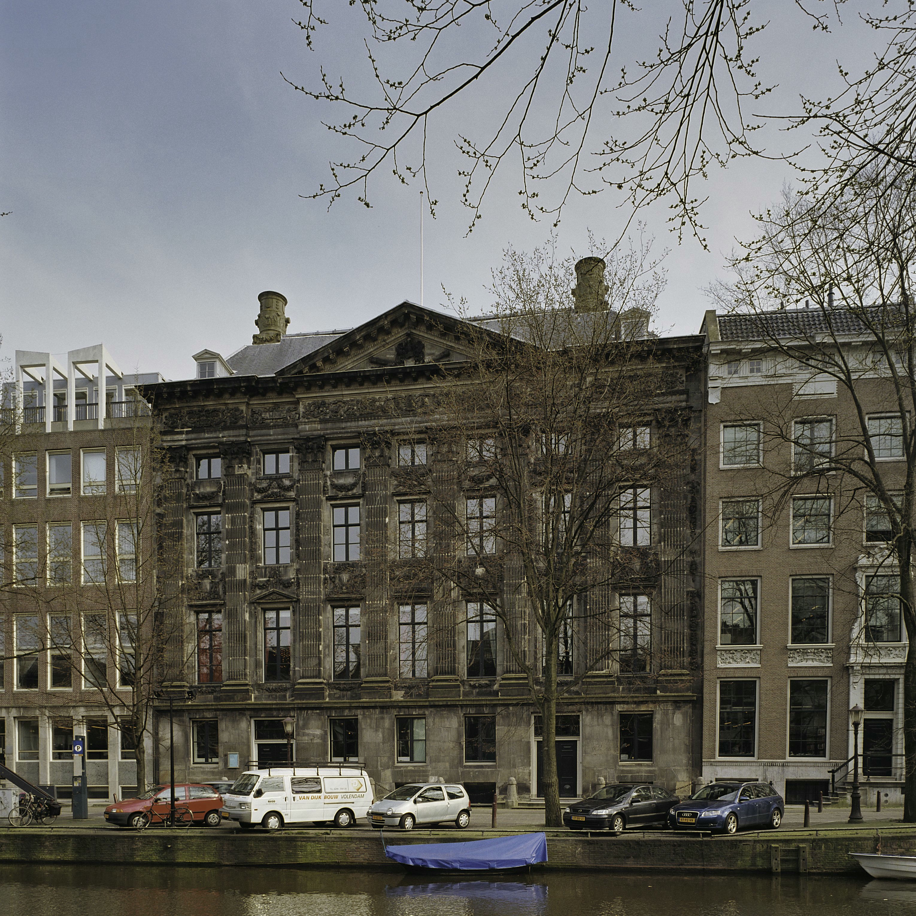 Het Trippenhuis: Overzicht voorgevel versierd met ranken, bloemen en festoenen, het bekronend fronton toont het familiewapen (opmerking: Gefotografeerd voor Monumenten In Nederland Noord-Holland)